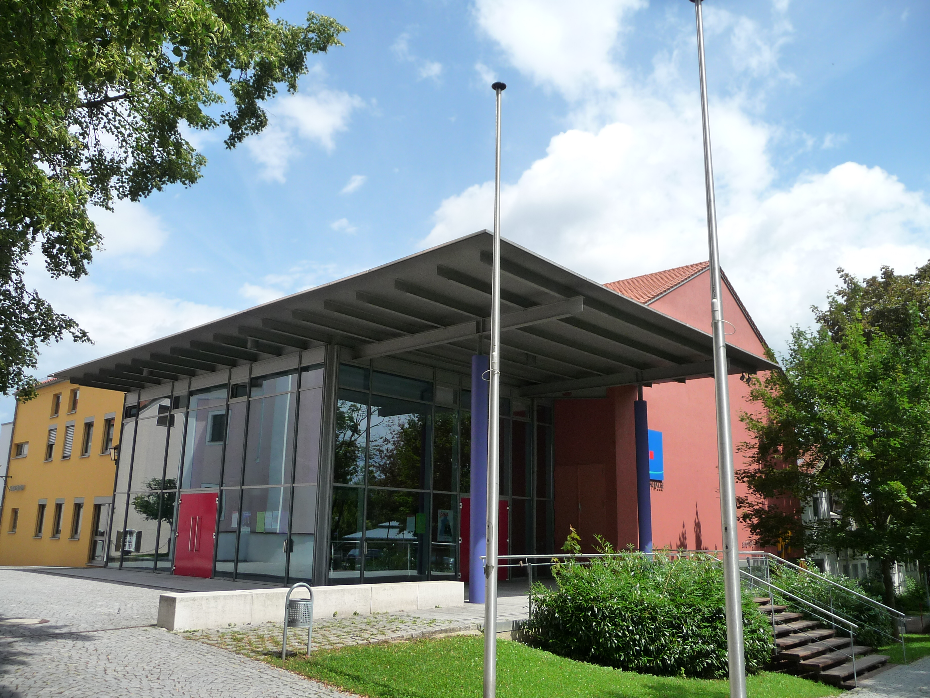 Die Stadthalle von Landau an der Isar